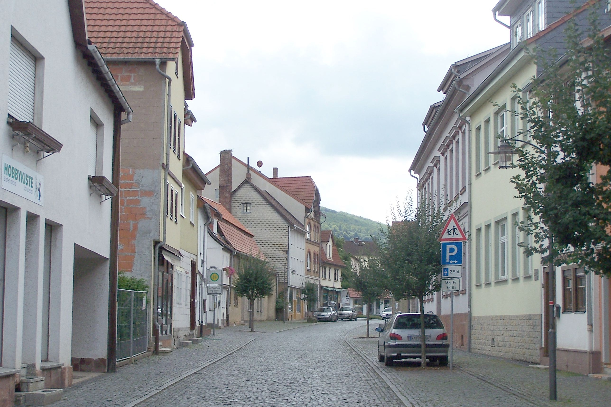 Vacha, Blick in den südlichen Teil der Schulstraße.